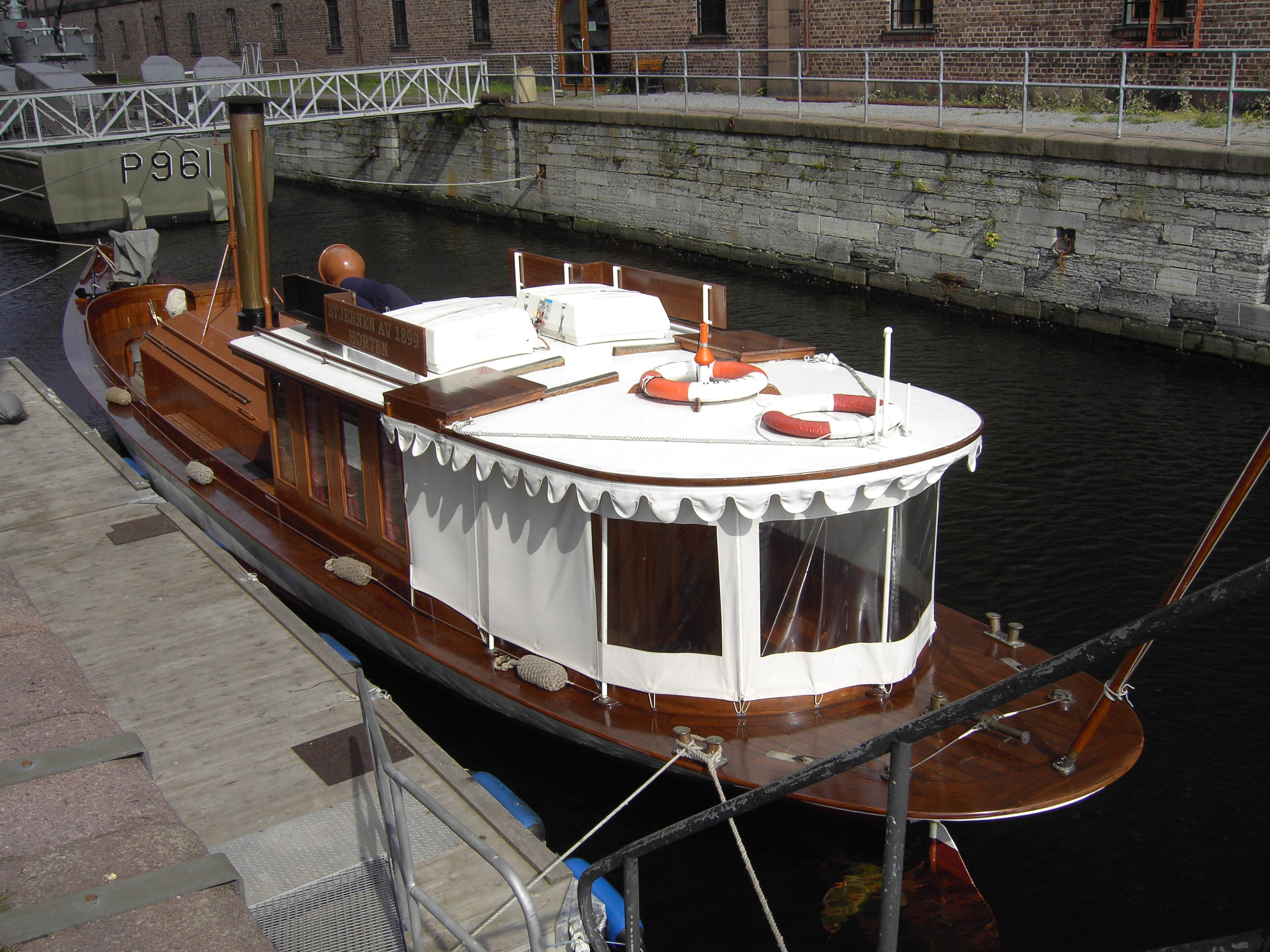 Kongesjaluppen «Stjernen» av 1899